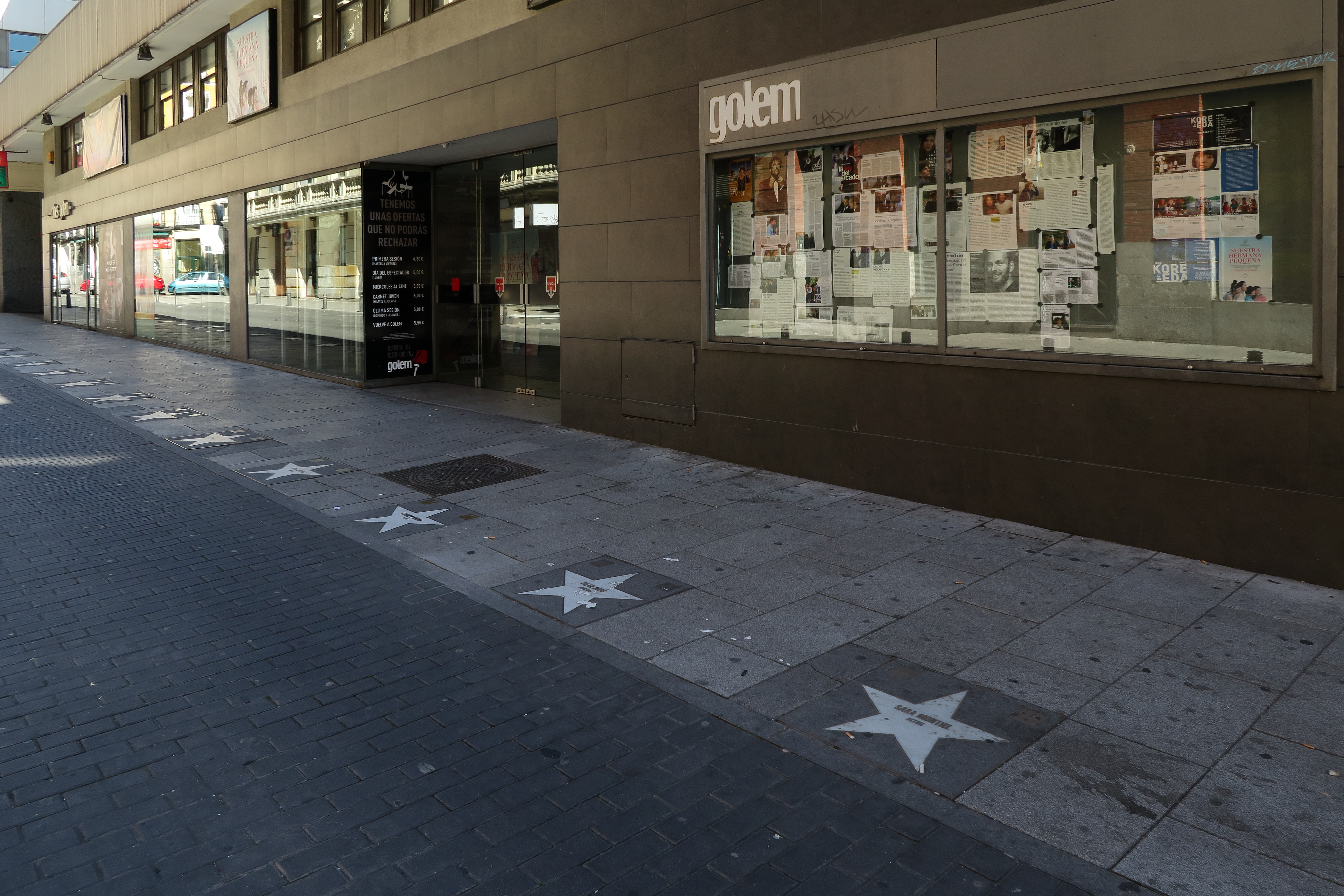 Paseo de la fama de Madrid, estrellas junto a los cines Golem